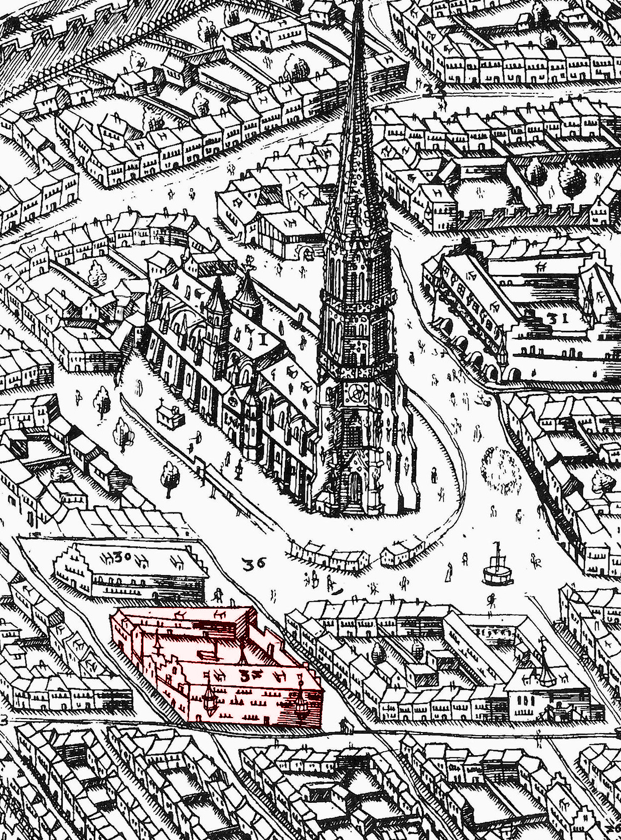 Der Basler Hof (Nr. 32, rot markiert) in Freiburg im Breisgau 1589. Ausschnitt aus dem sog. „Großen Sickinger Plan“, Vogelschauplan von Nordwesten.